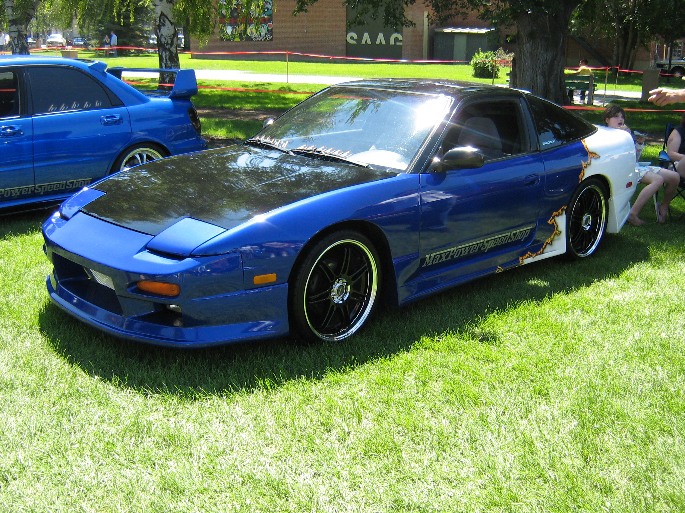 Nissan 240SX